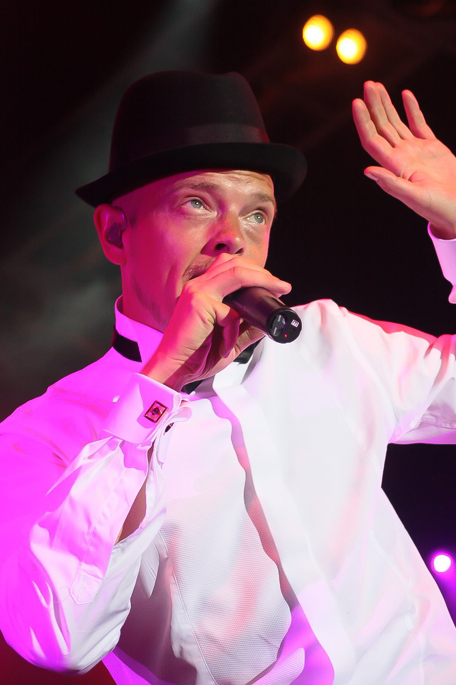 Jan Delay